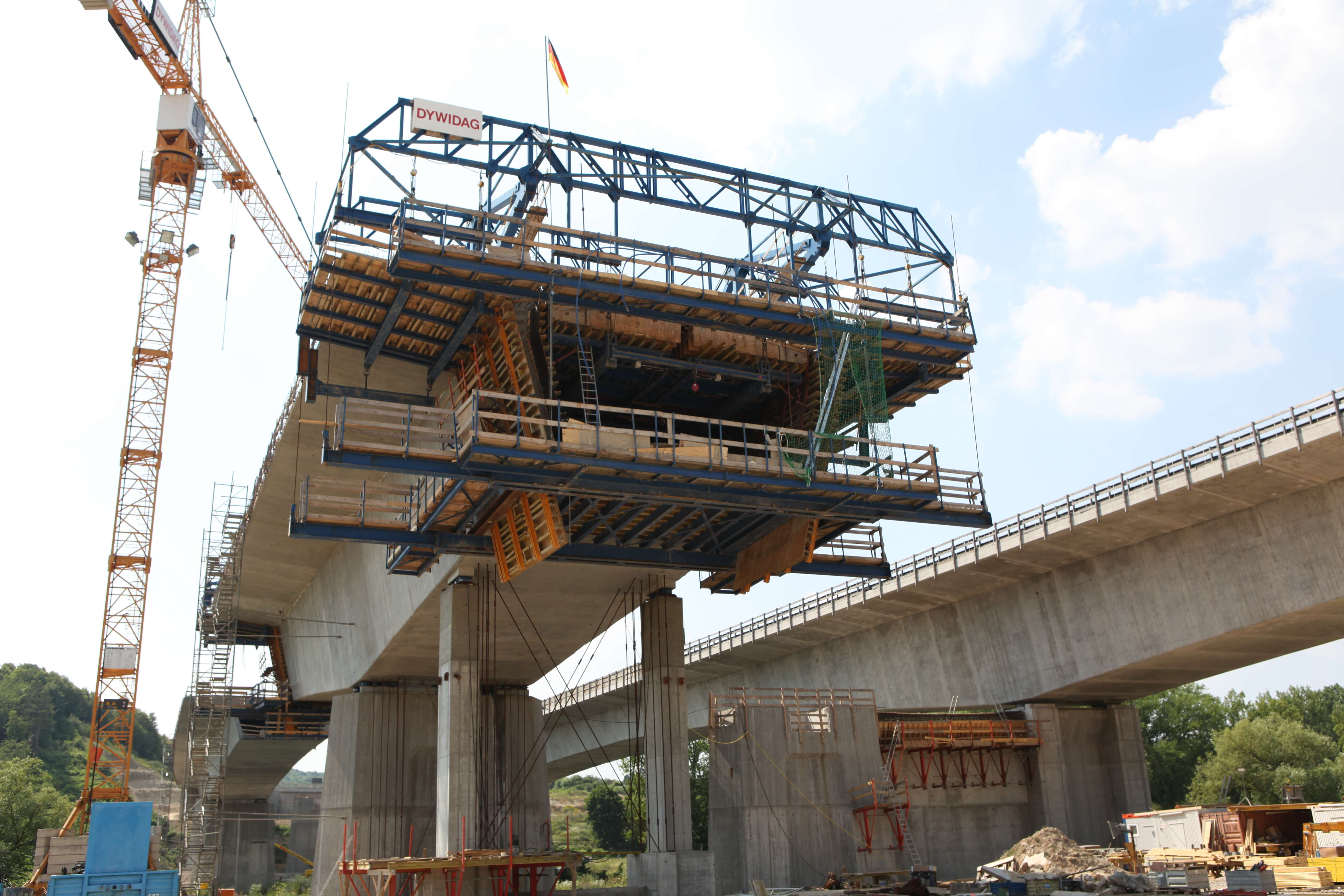 Mainbrücke Randersacker bei Würzburg